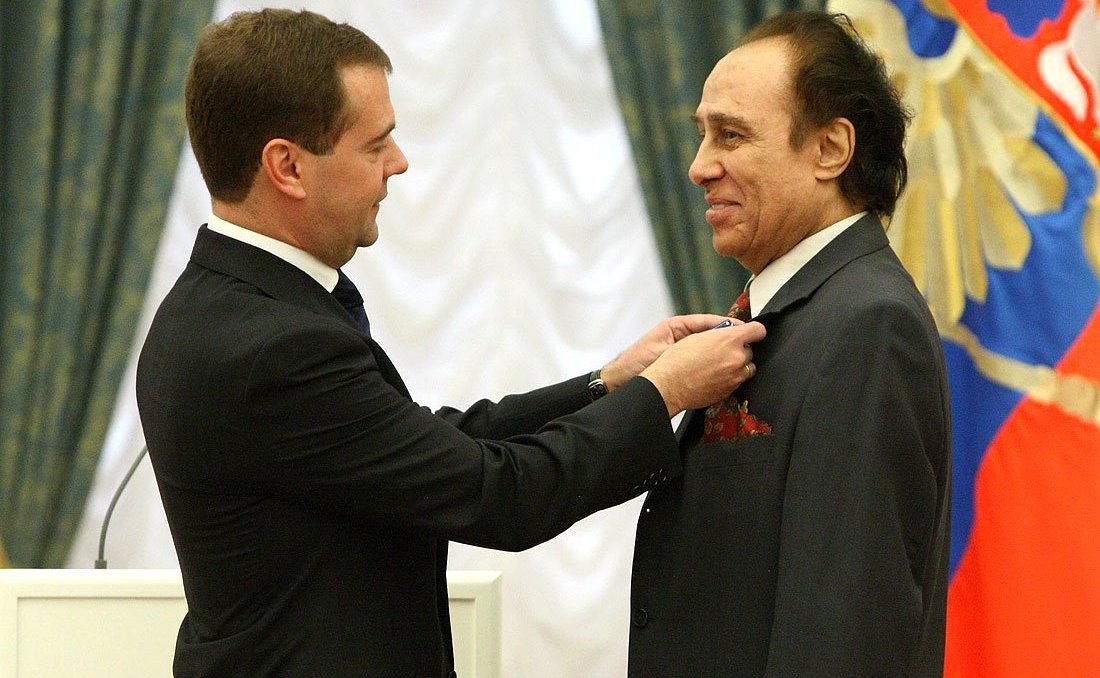 Николай Сличенко